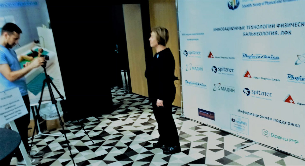 Председатель Правления Международного общественного Движения К Здоровью через Культуру Людмила Бобина подводит итог 18-й научно-практической конференции «Инновационные технологии физической терапии. Бальнеология. ЛФК», состоявшейся в Москве 29 июня 2019 года в конференц-зале "Азимут отель Смоленская".